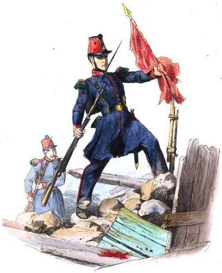 Garde nationale mobile, 18e bataillon (Juin 1848).